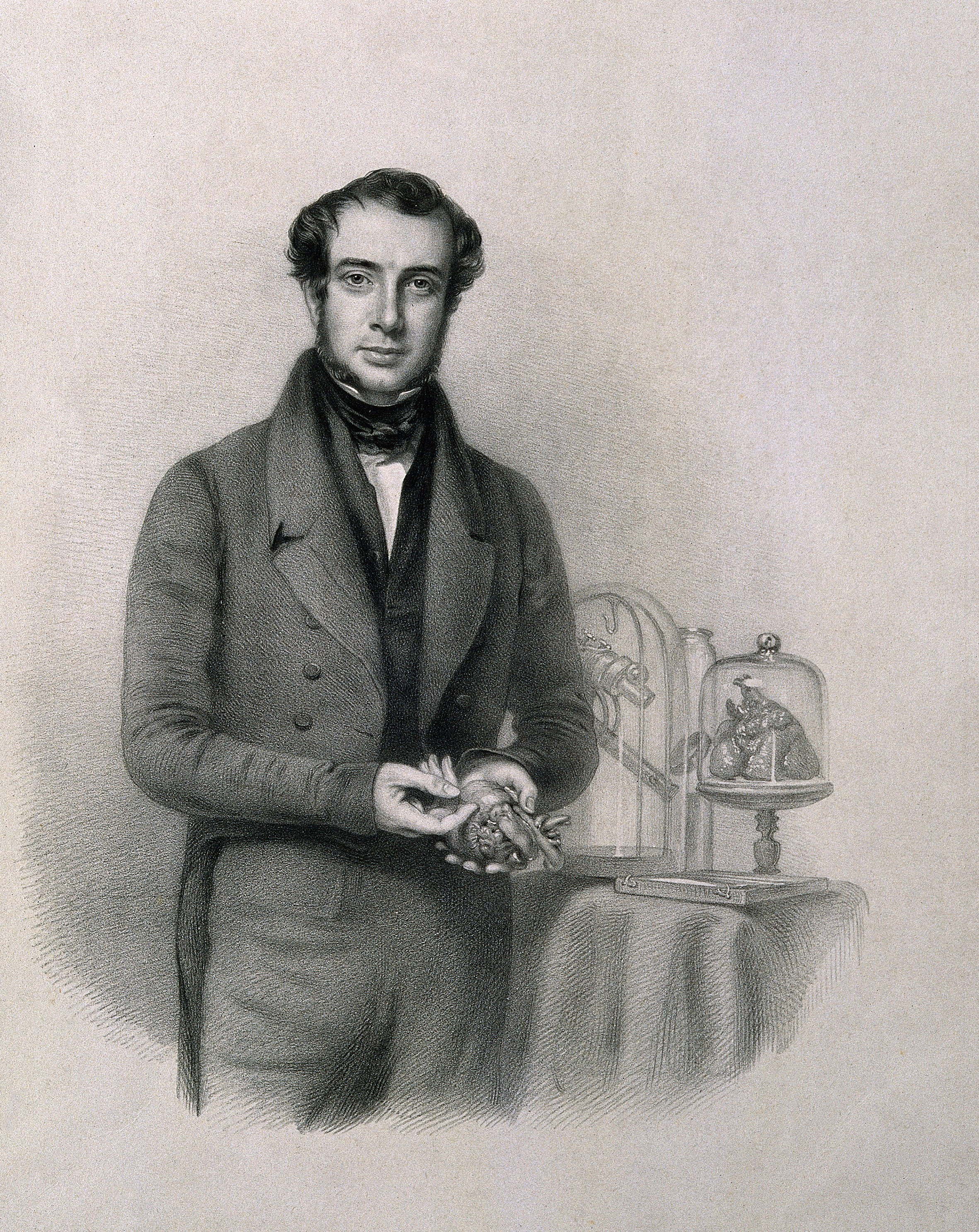 Genre/Technique: Portrait prints. Lithographs. Subject name: Lane, Samuel Armstrong, 1802-1892.